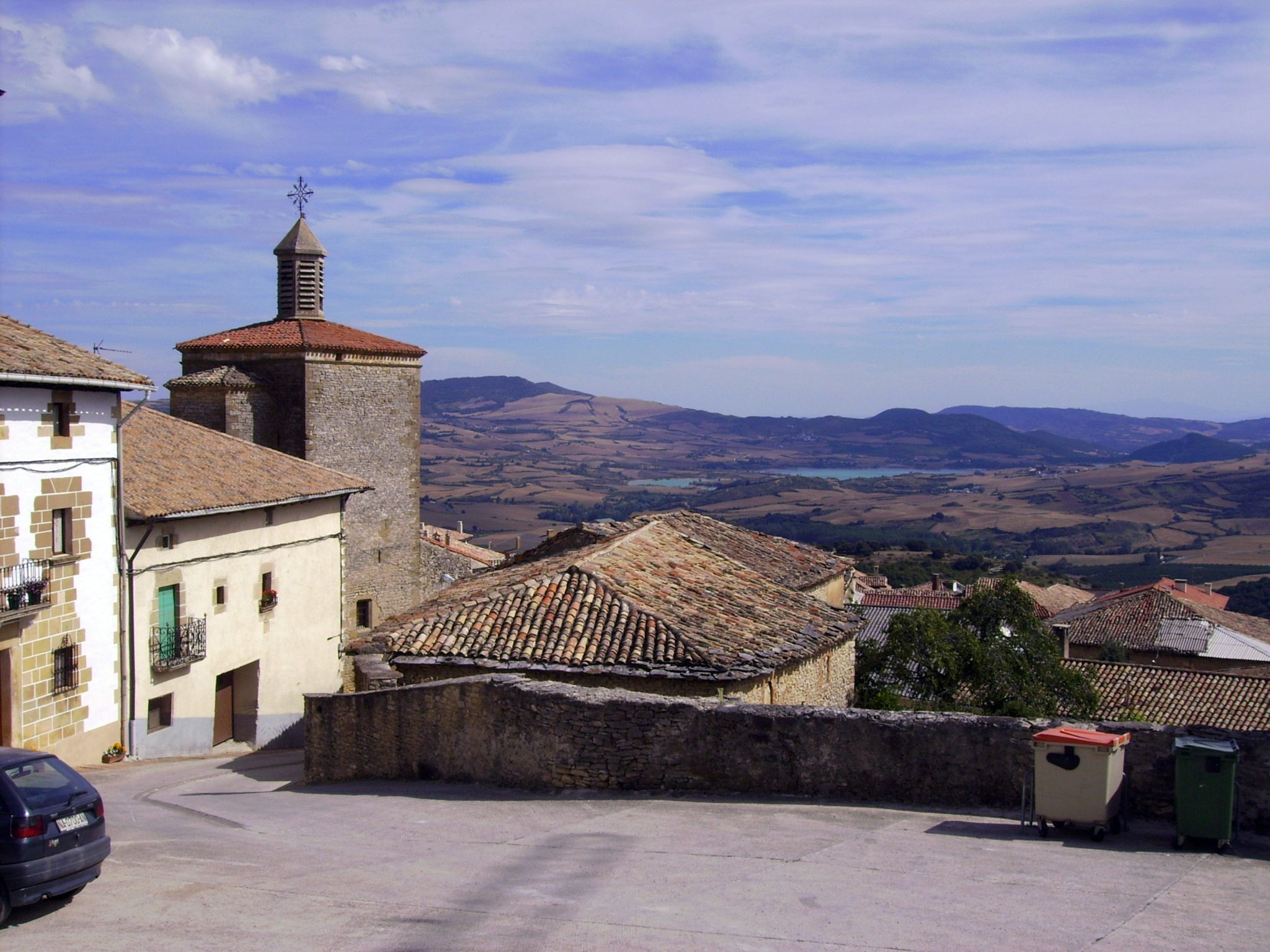 Iturgoyen